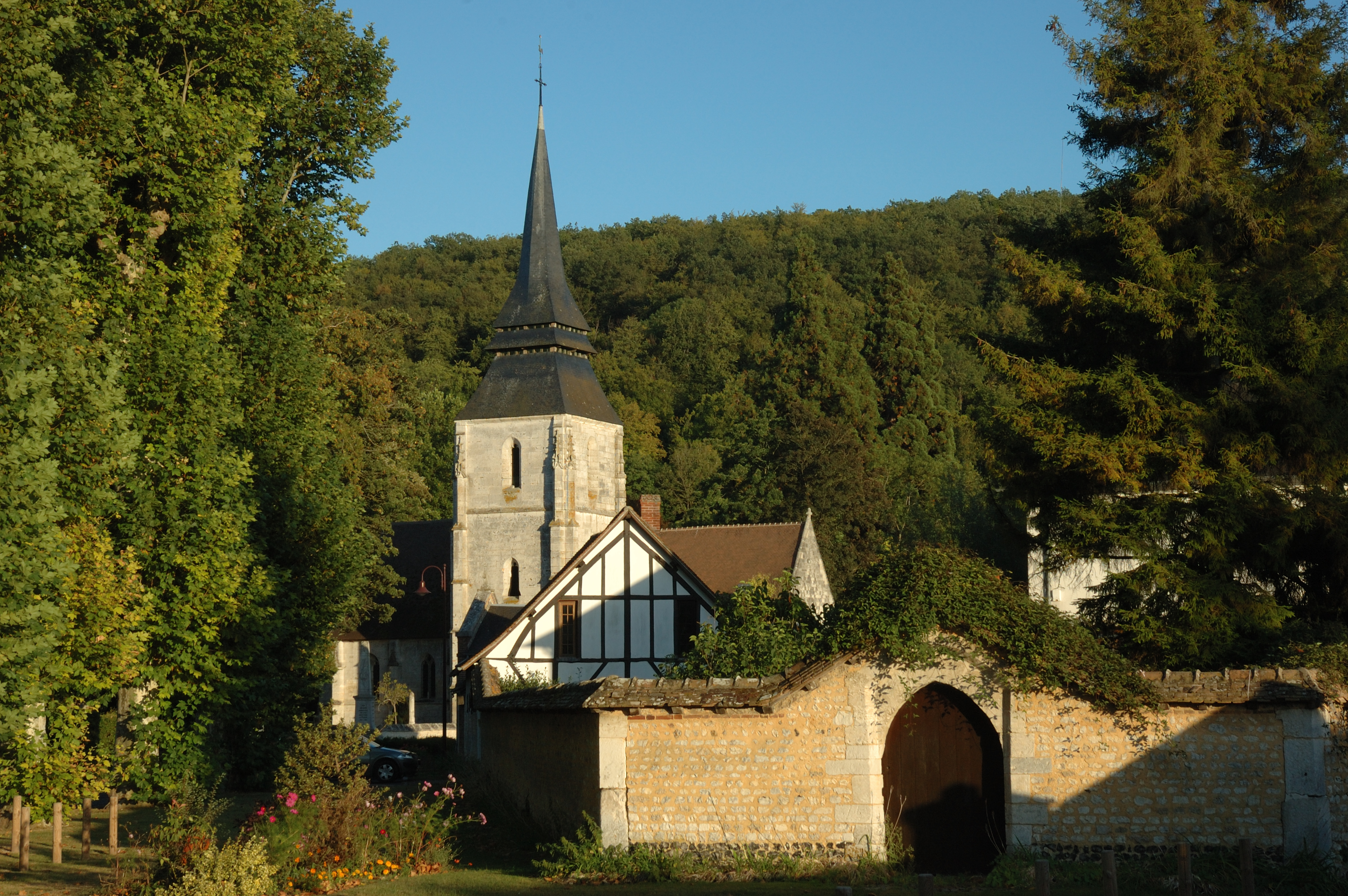 Eglise à Amfreville-sur-Iton .